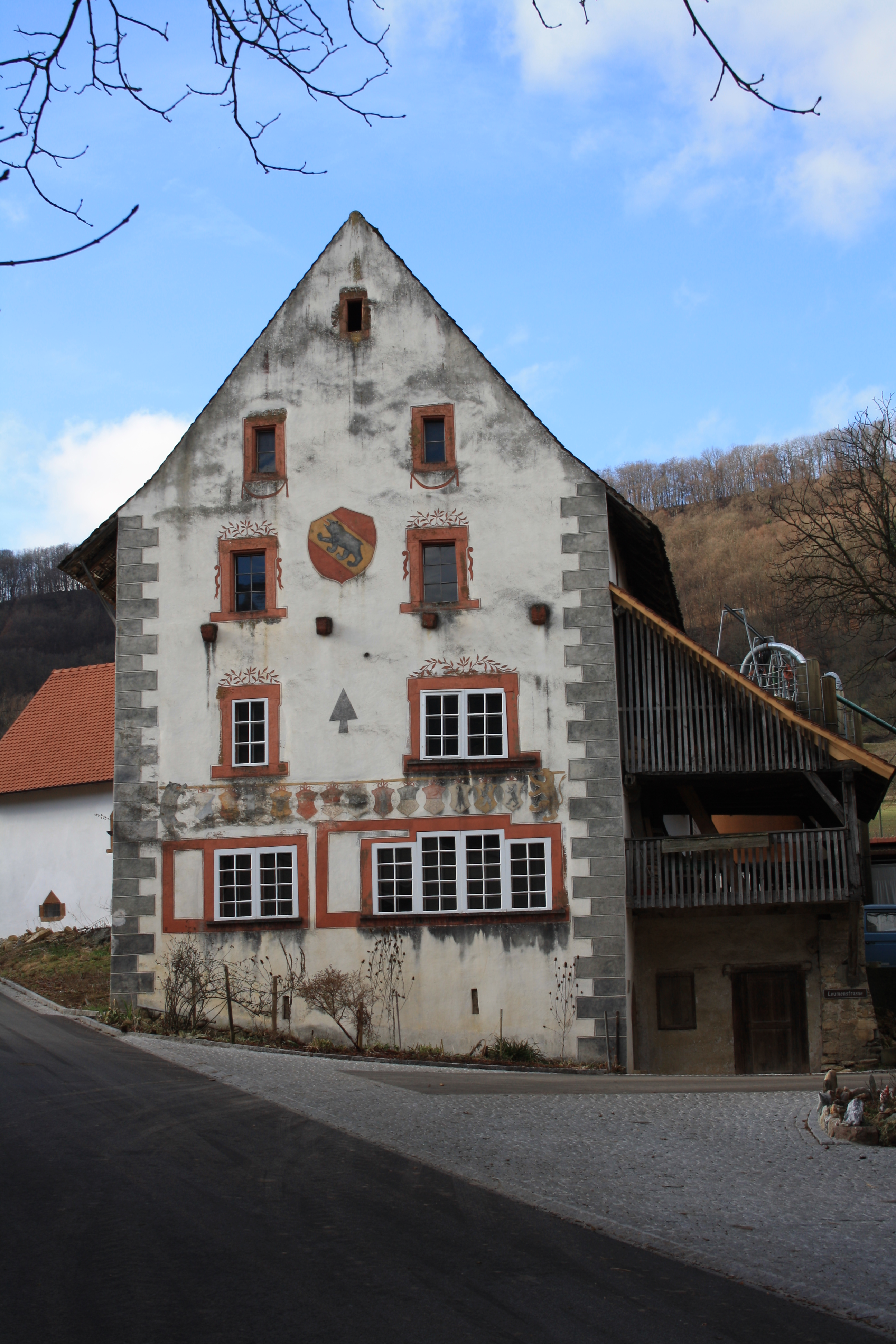 Ehemalige Untervogtei in Hottwil, Gemeinde Mettauertal, Kanton Aargau, Schweiz